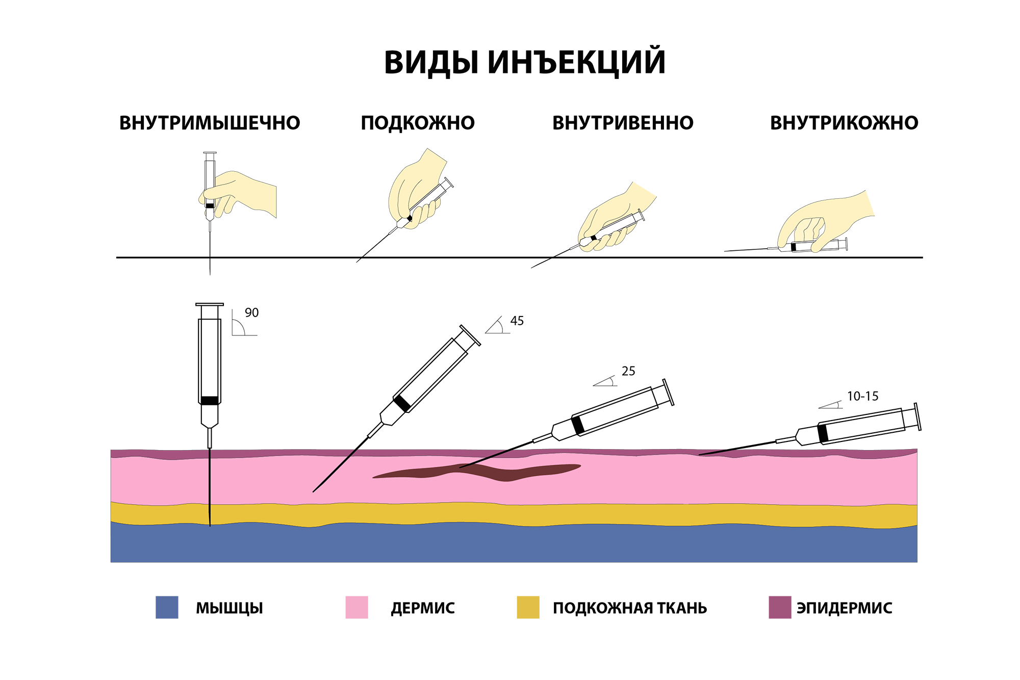 Инфографика основных видов медицинских инъекций. Отображение положения рук, слоев человеческих тканей. Угол правильного введения шприца